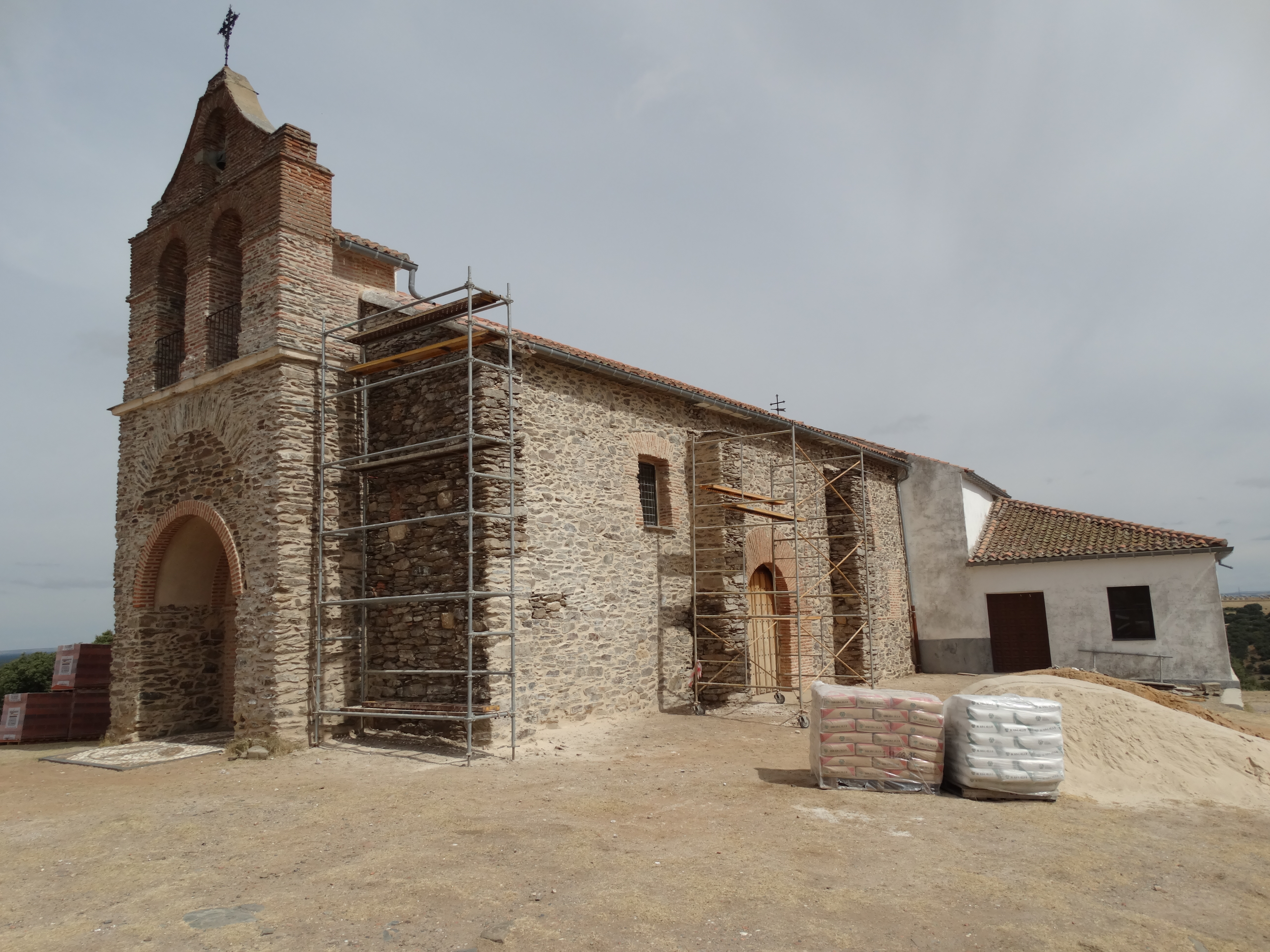 Bernardos, provincia de Segovia, España. Cerro de la Virgen del Castillo. Ermita en restauración.